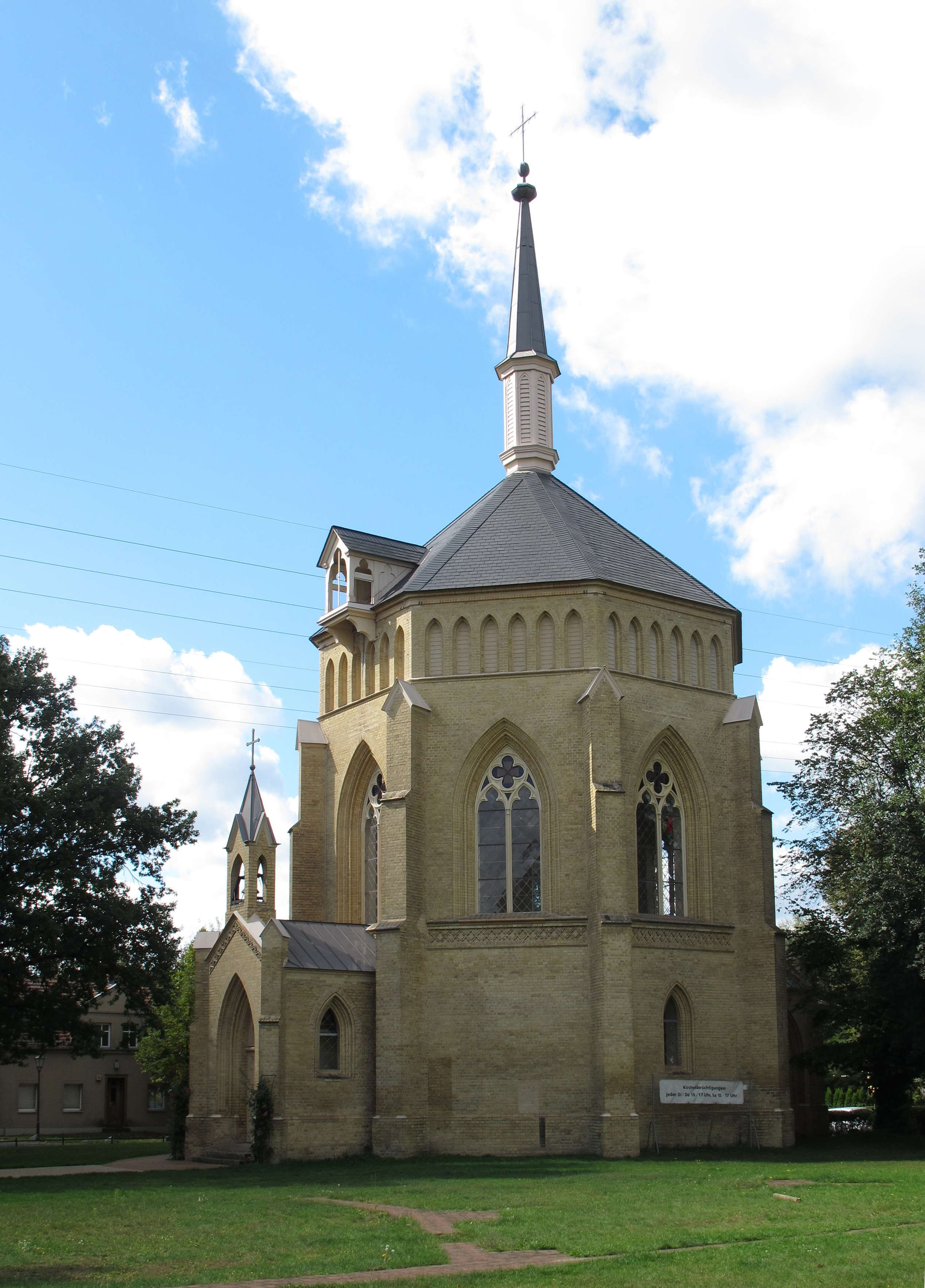 Alte Neuendorfer Kirche am Neuendorfer Anger, Potsdam-Babelsberg